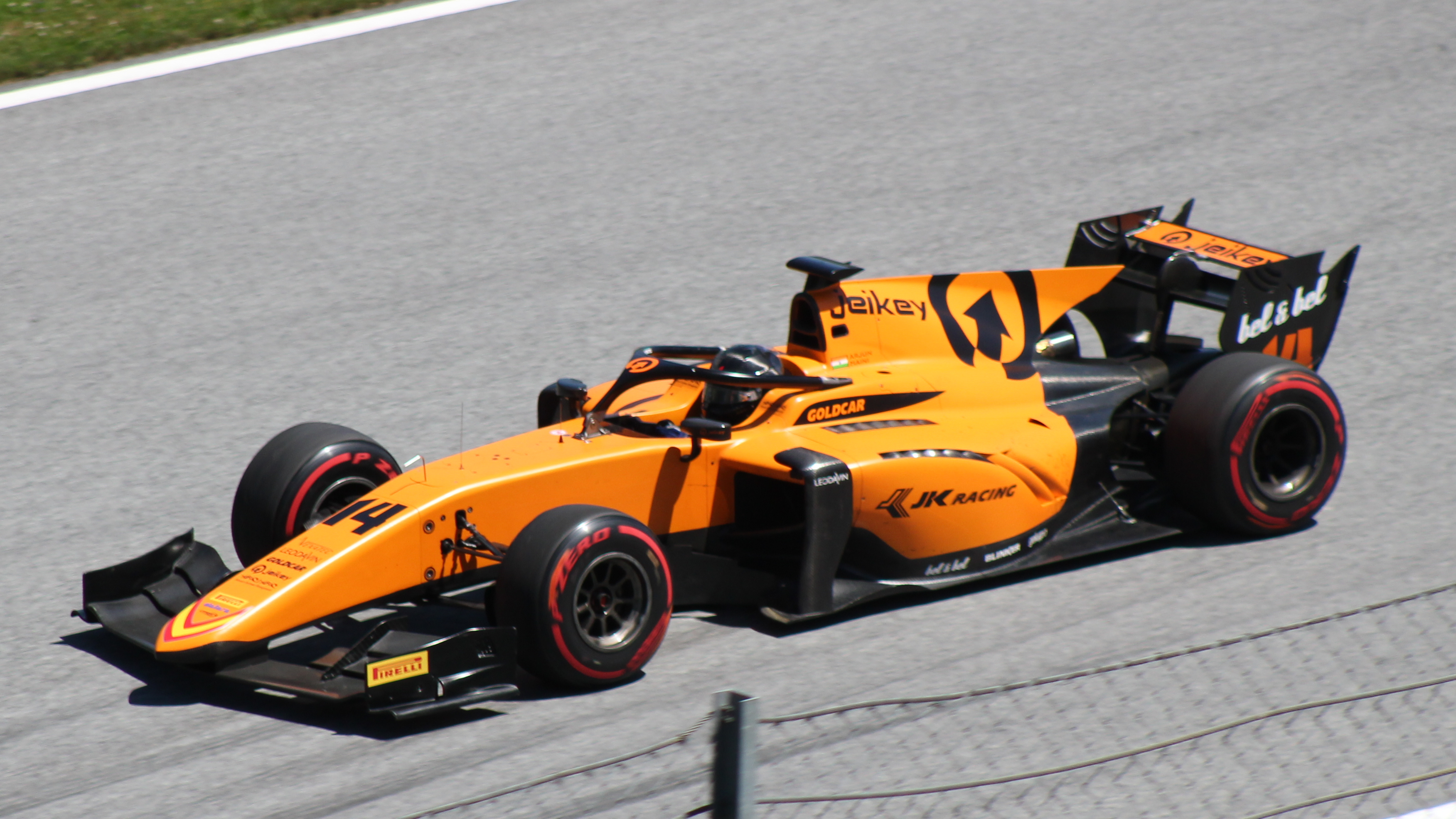 Maini beim Rennwochenende in Österreich 2019